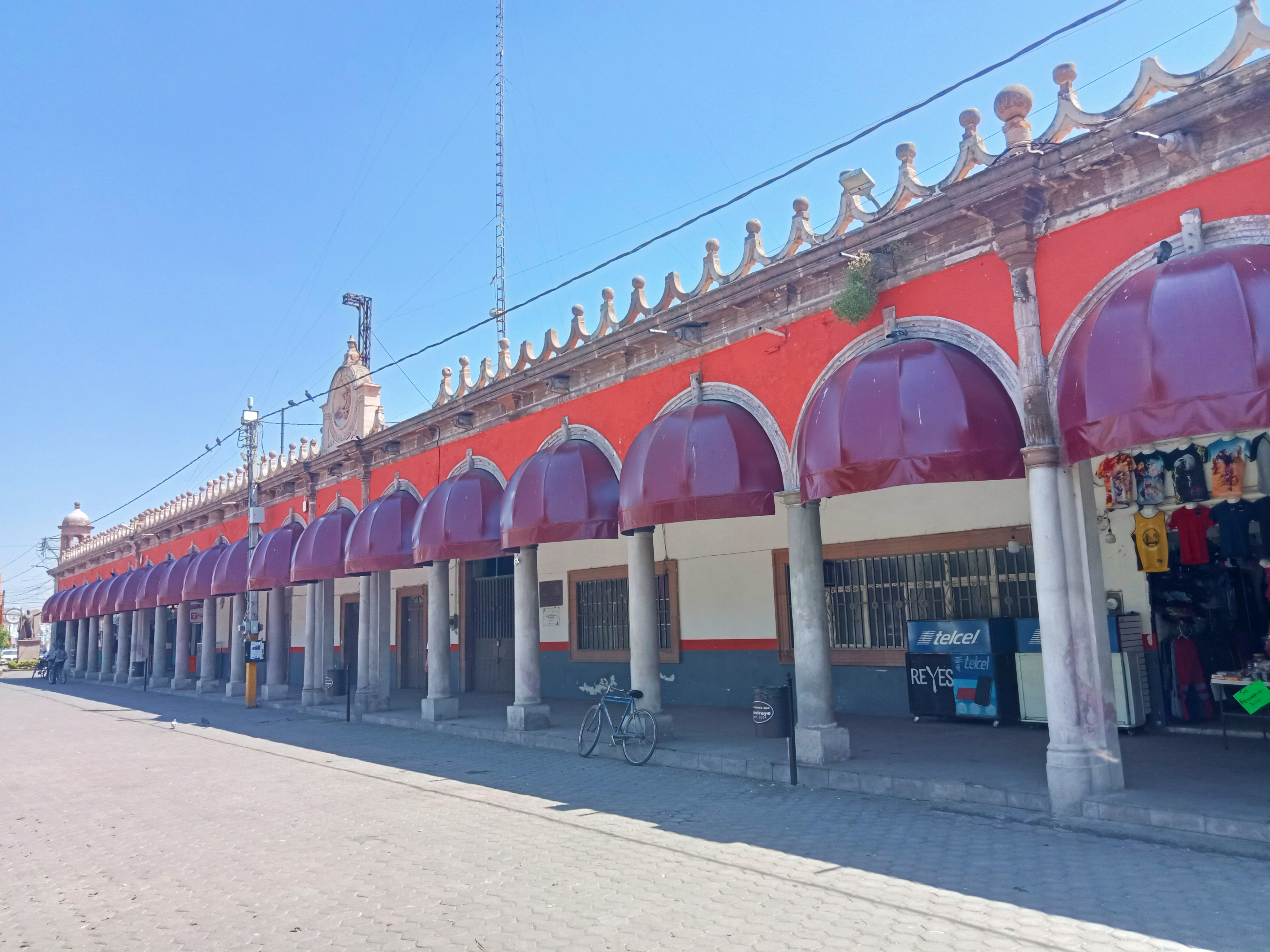 Portal Hidalgo y palacio municipal en la ciudad de Yurécuaro, en Michoacán